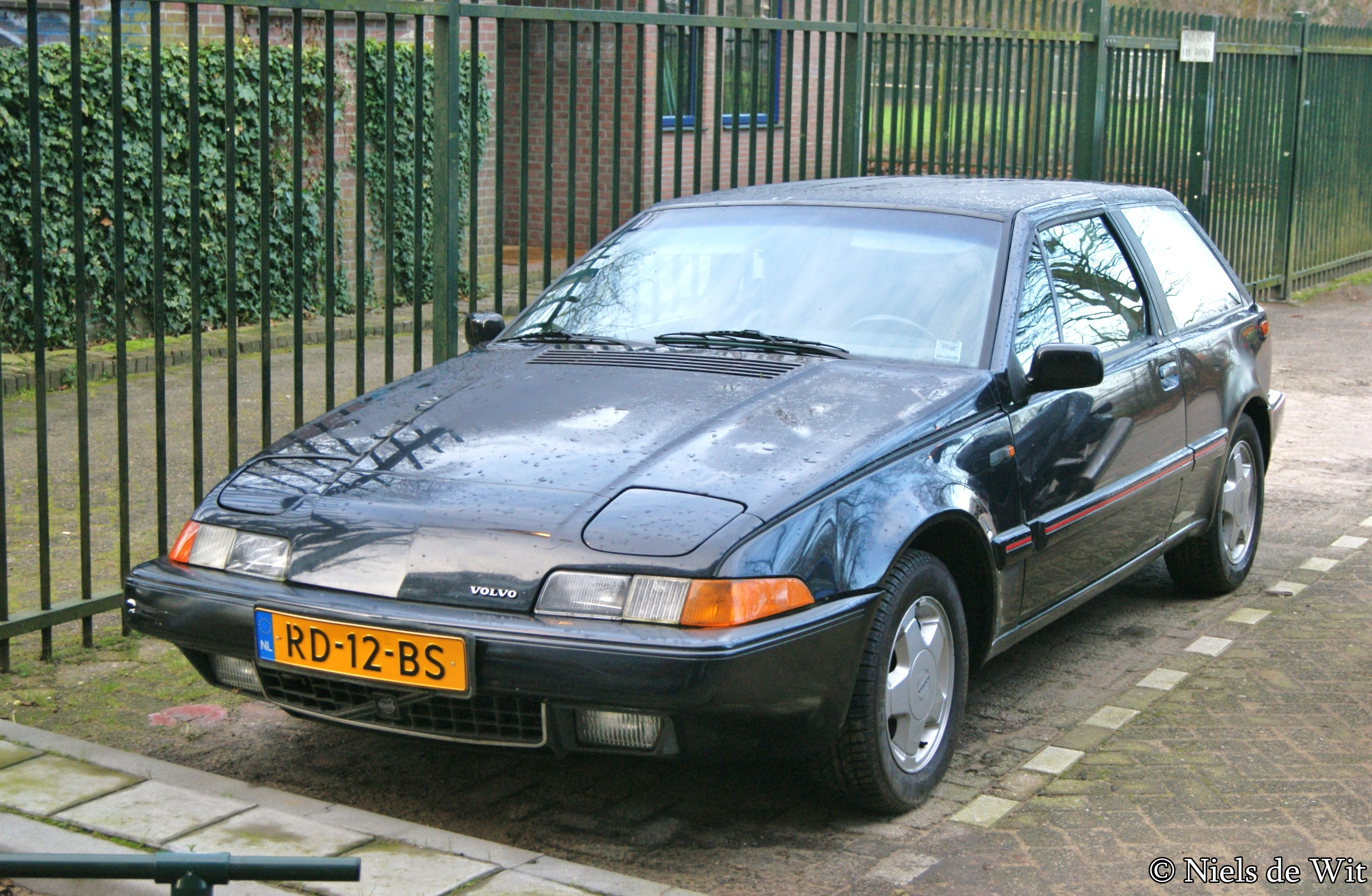 RD-12-BS